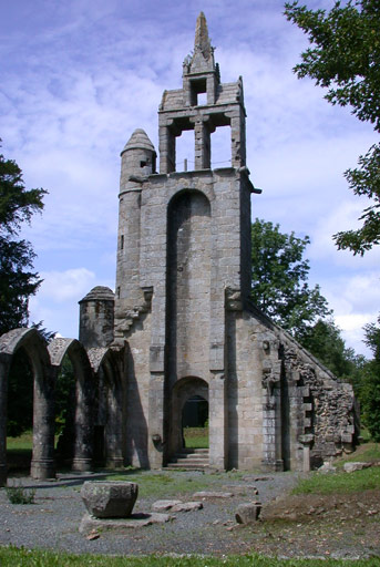 Description : Callac (22) - Ruines de l'église de Botmel Date : juillet 2004 Auteur : Ifernyen Source : Archives personnelles Statut : GFDL Ifernyen